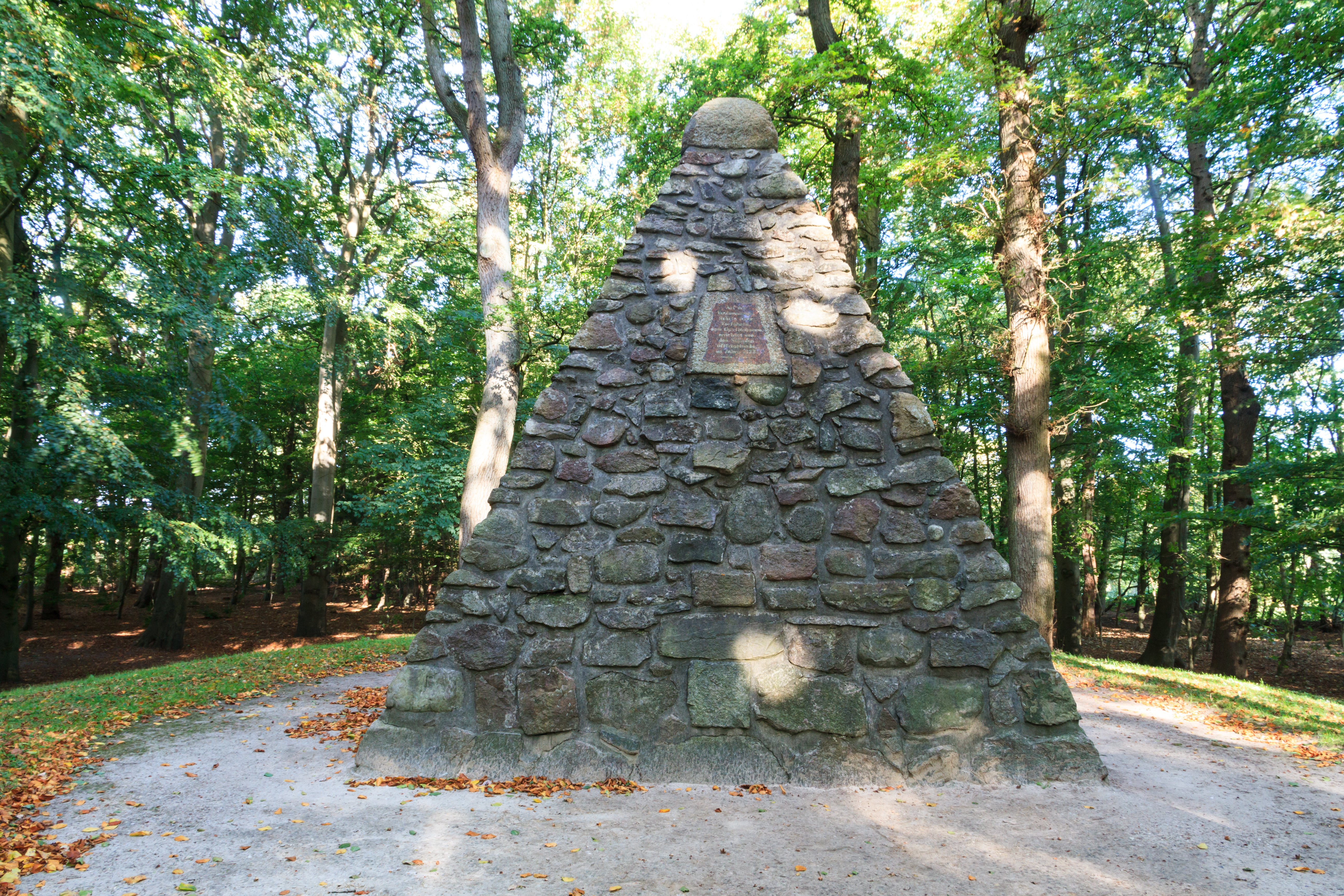 Upstalsboom